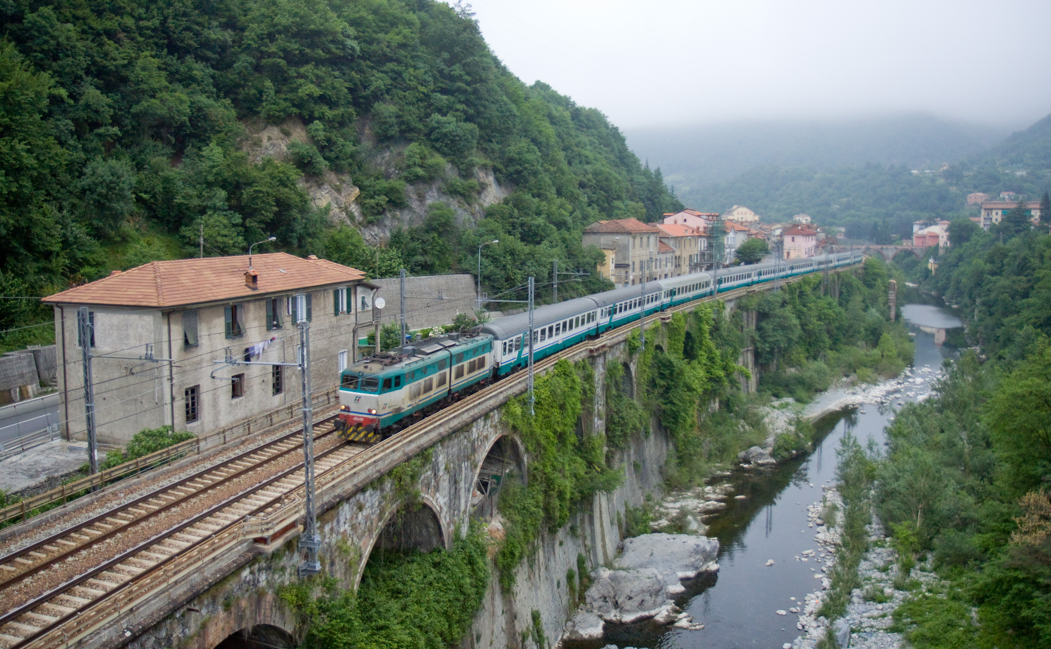 Treno Intercity trainato da una E.656 sulla vecchia linea dei Giovi presso Isola del Cantone